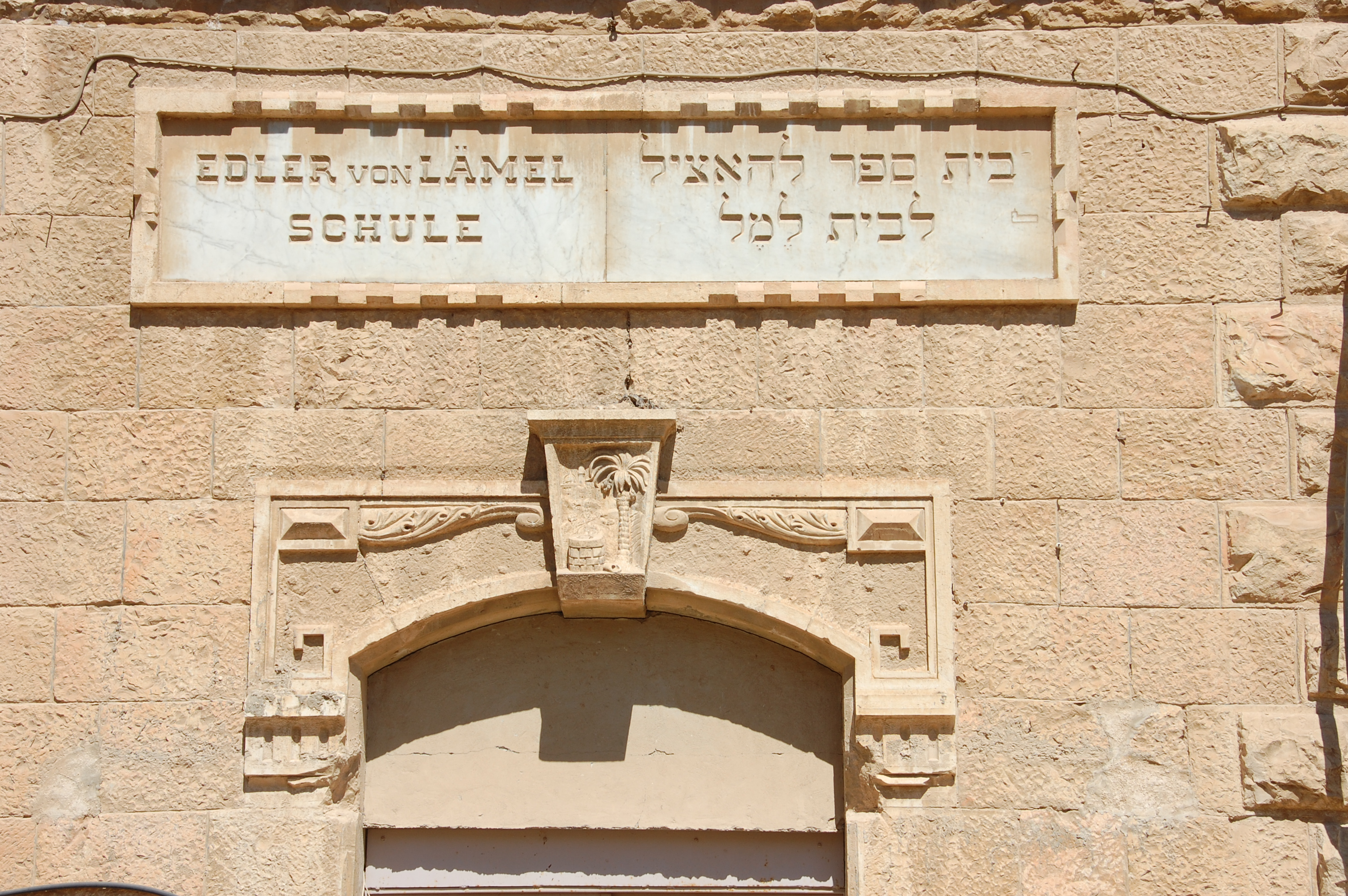 lemel school, jerusalem